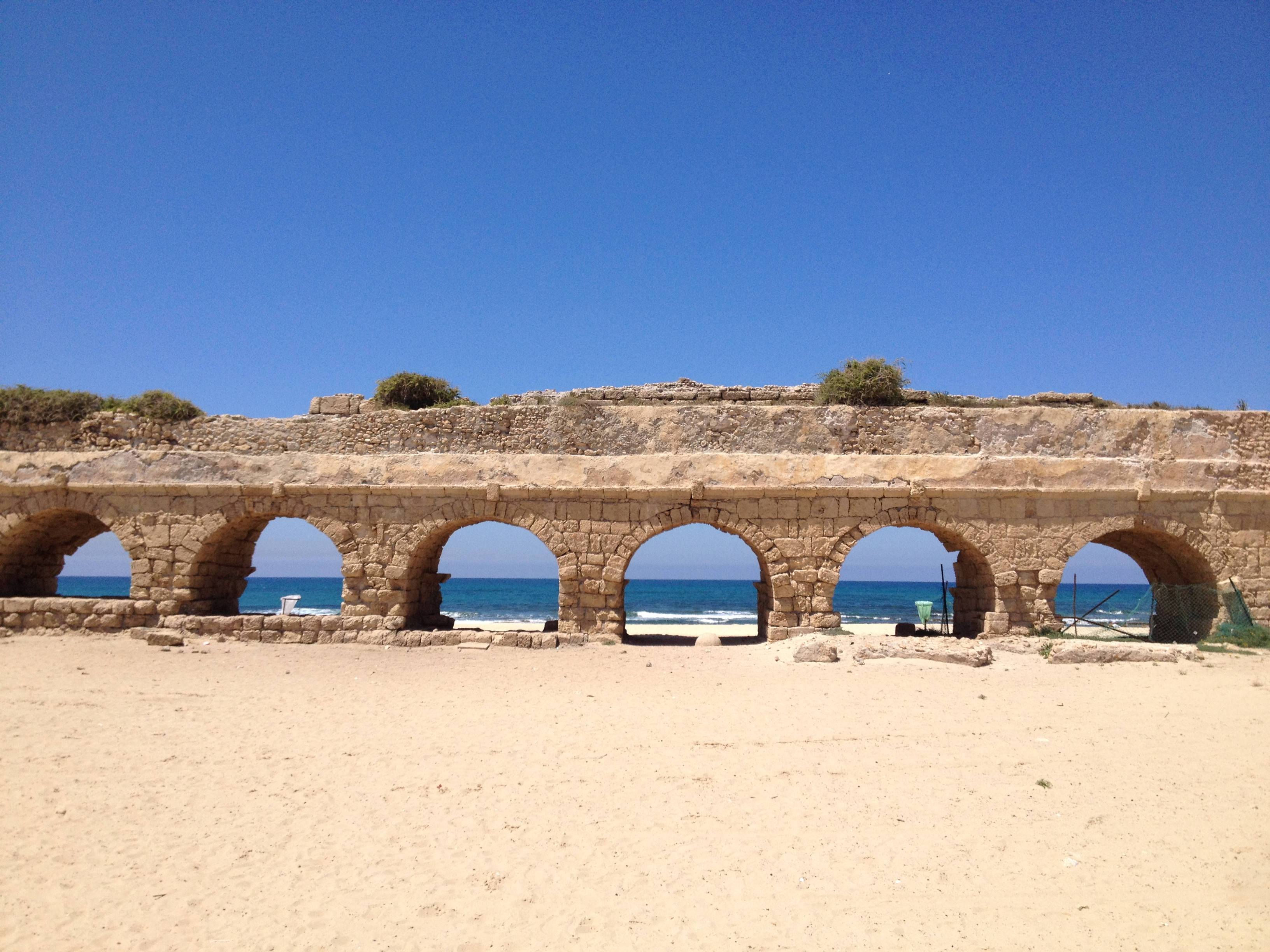 קיסריה היא עיר נמל שהוקמה בשנים 13-25 של לפנה"ס. היא שימשה כבירת ארץ ישראל בתקופה הרומית, ונקראה על שם אוגוסטוס קיסר. כיום העיר העתיקה היא גן לאומי ולידה הוקמה קיסריה המודרנית.